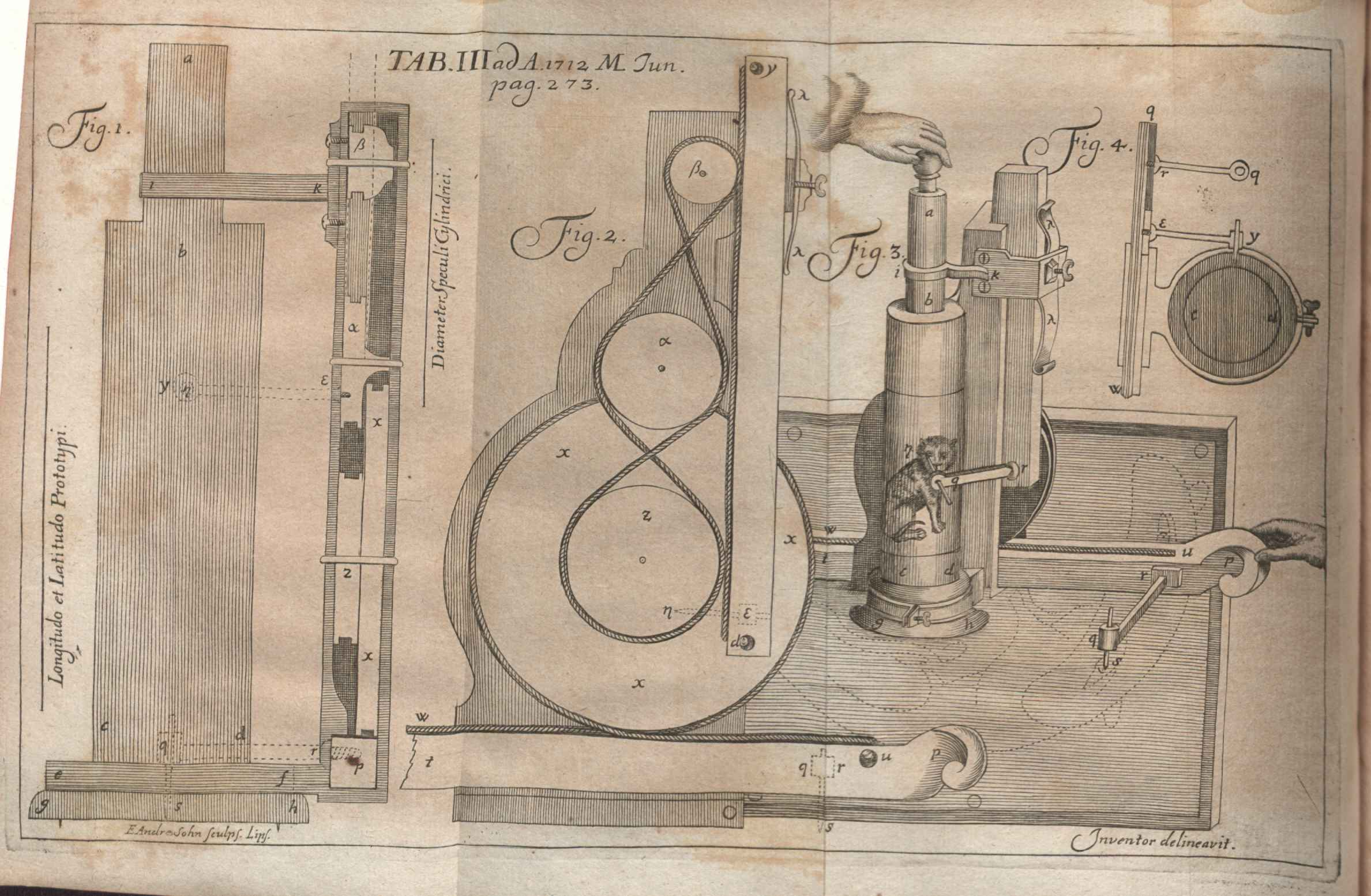 Illustration